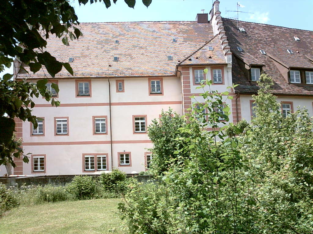 Malteserschloss Heitersheim von Osten